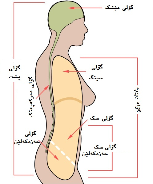 Kurdî: گۆلەکانی لەش